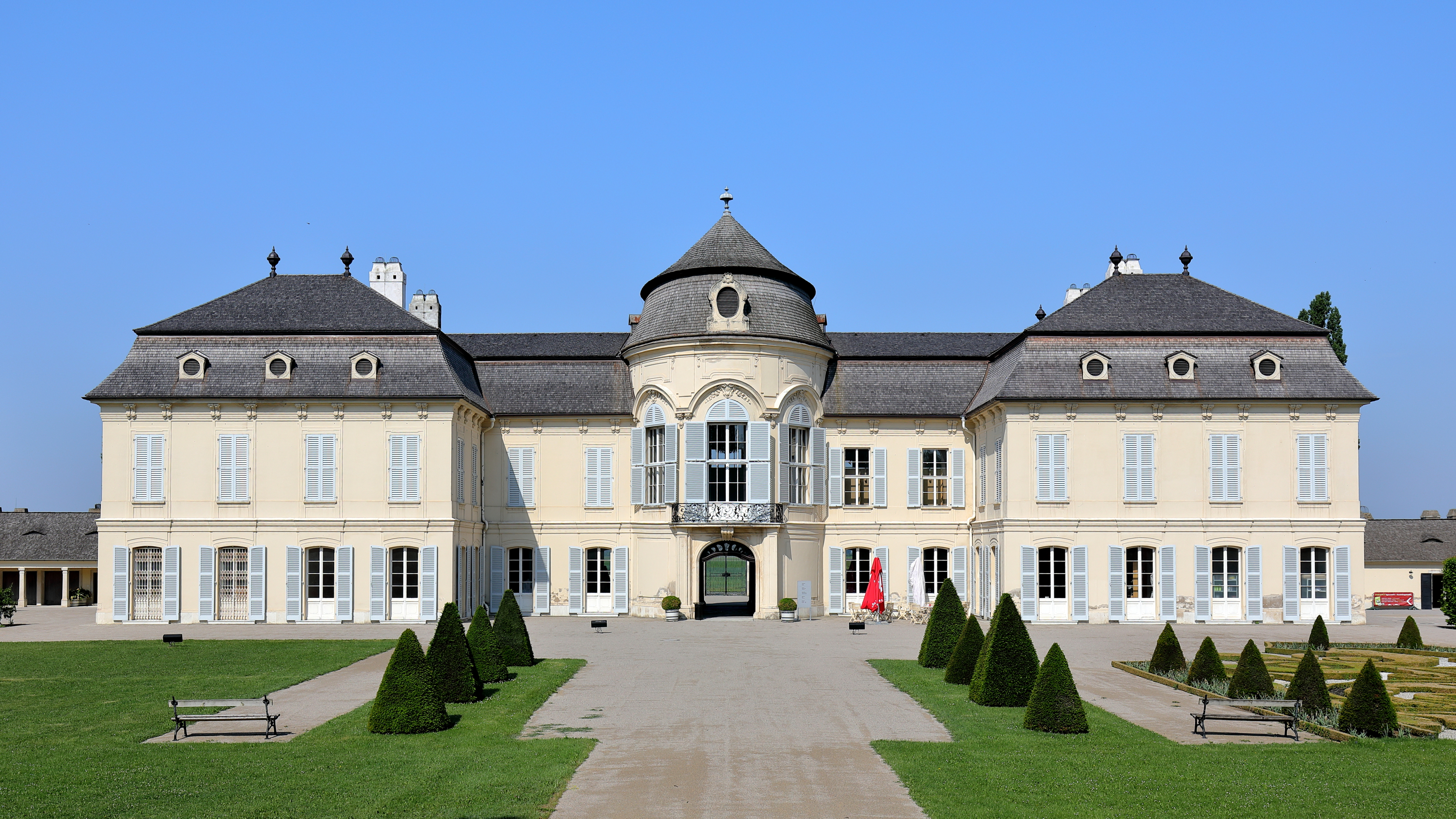 Ostansicht bzw. gartenseitige Fassade des Schlosses Niederweiden in der niederösterreichischen Marktgemeinde Engelhartstetten.Der Vorgängerbau wurde bei der 1. Türkenbelagerung zerstört. 1685 übernahm Ernst Rüdiger von Starhemberg die Herrschaft und ließ unmittelbar neben der öde Veste durch Johann Bernhard Fischer von Erlach ein Lustschloss errichten. 1725 wurde das Schloss von Prinz Eugen von Savoyen erworben und später dann von Maria Theresia. Diese ließ das Schloss um 1765 durch den Hofarchitekten Nikolaus Pacassi umbauen. Dabei erhielt das Schloss im Wesentlichen sein heutiges Erscheinungsbild. Nach schweren Kriegsschäden 1945 und einem Brand 1956 begann man mit der Restaurierung und Rekonstruktion, die 1986 abgeschlossen wurde.